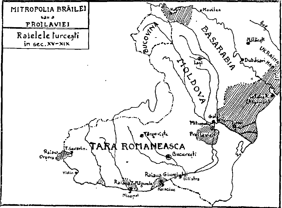 Autor - Iulian Măcreanu Denumire - Harta Mitropoliei Proilaviei, scanată din revista Analele Brăile, nr 1, 1939 Restricţii - fişierul poate fi folosit fără restricţii datorită vechimii sale